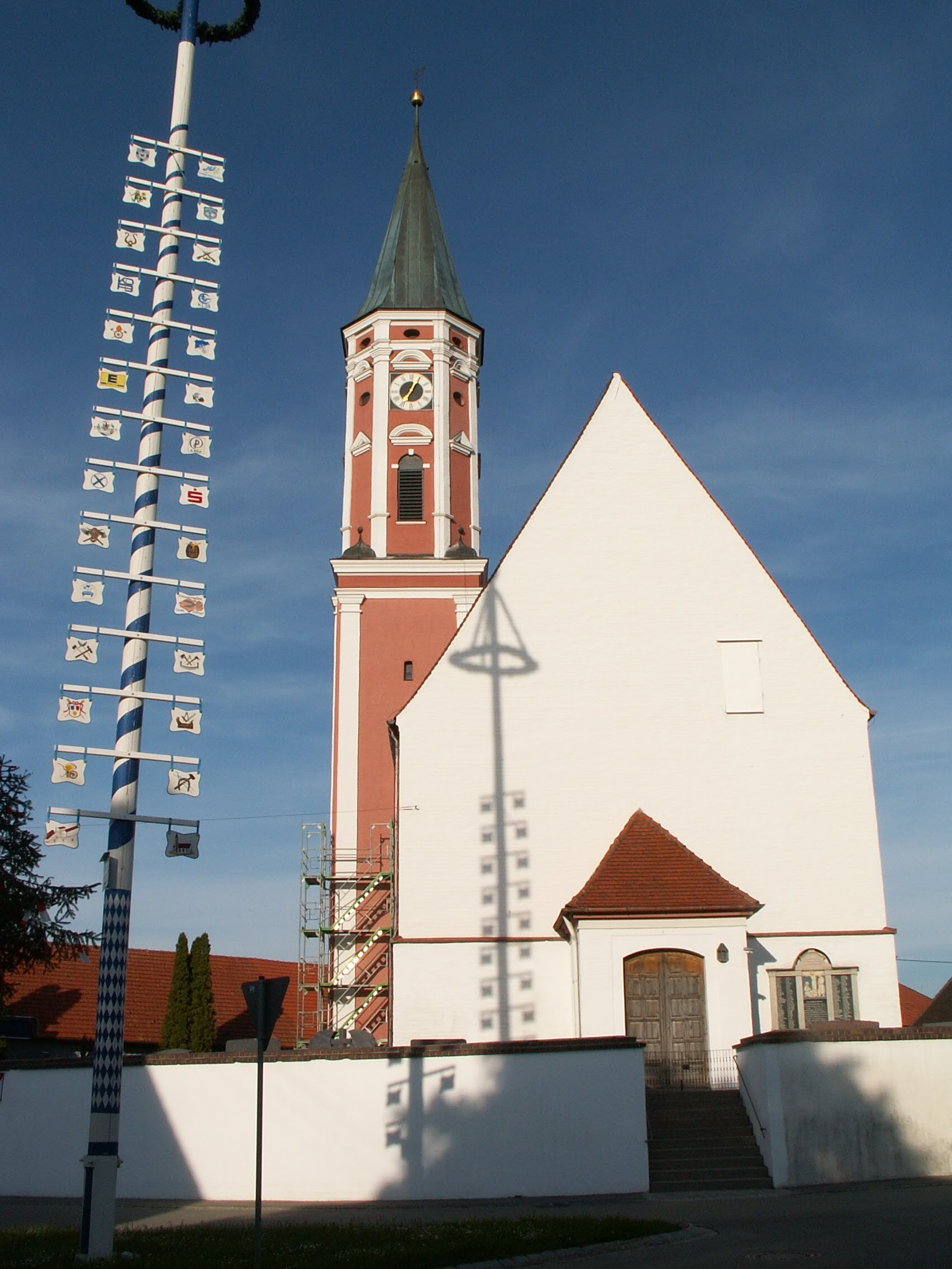 Kirche in Weil